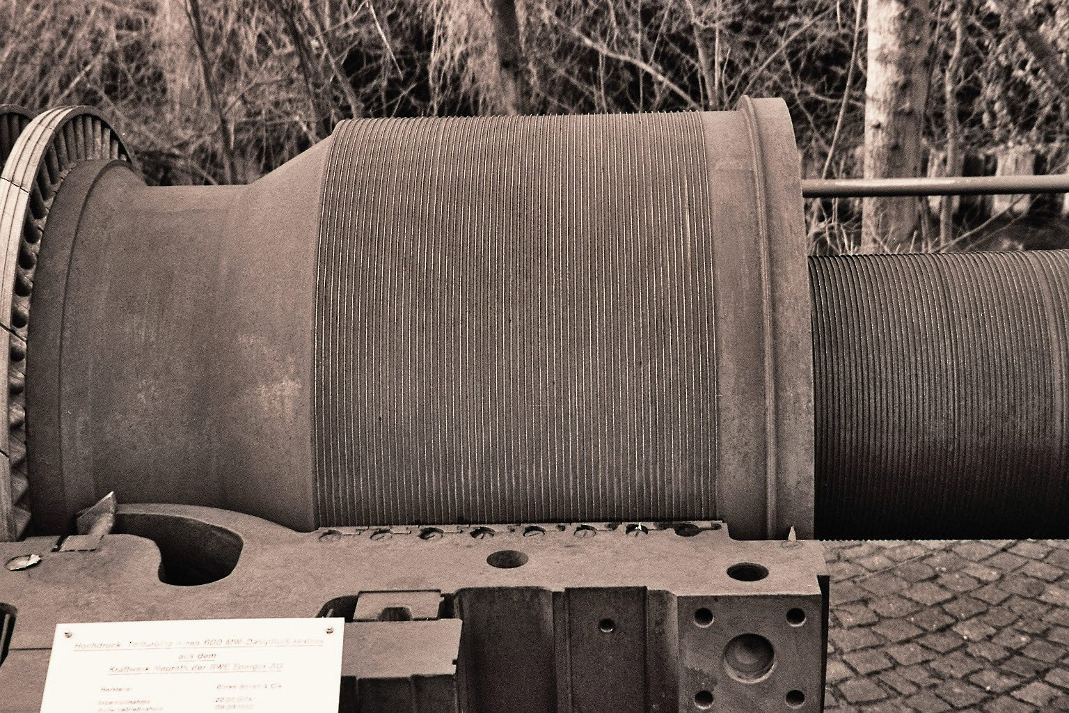 Labyrinthdichtung an einer Dampfturbine